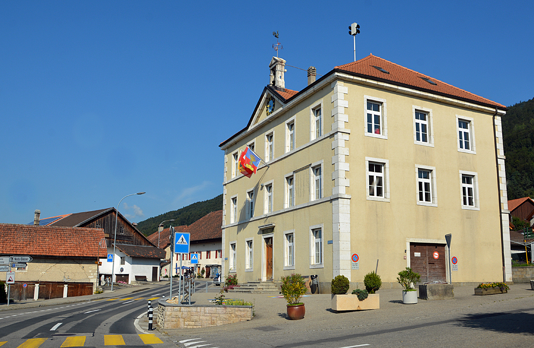 Das Dorf Lamboing in Kanton Bern (Schulhaus)